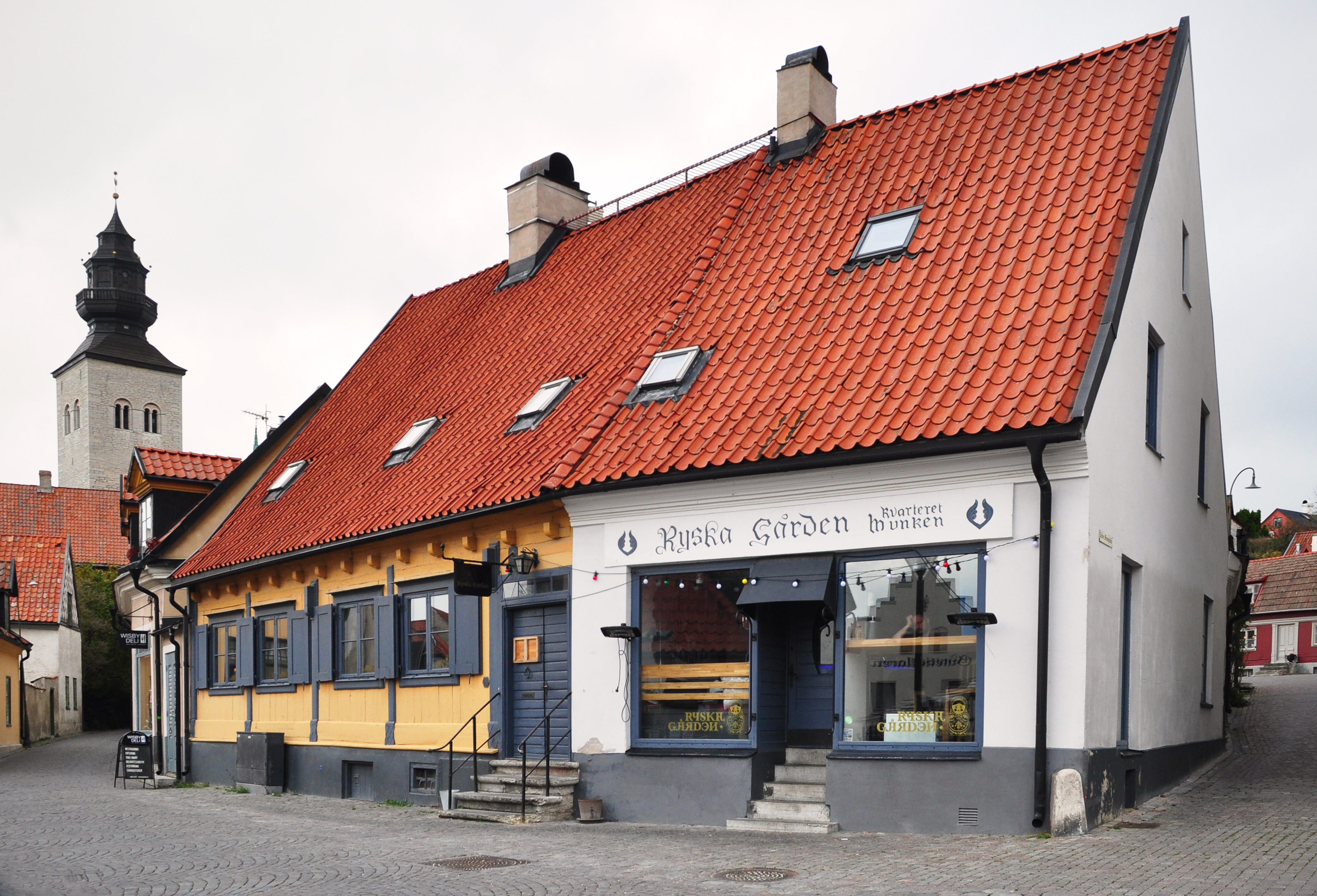 Ryska gården, Munken 12, Södra Kyrkogatan 14, Visby, Gotland. I Riksantikvarieämbetets Bebyggelseregister kan man läsa om fastigheten Munken 12. "Den avgränsas av Stora Torget i sydväst, Södra Kyrkogatan i väster och Ryska gränd i söder. På fastigheten finns idag två byggnader som ursprungligen var fristående, men idag är de sammanbundna med varandra. De båda husen, främst det nordligast belägna, har en välbevarad, ålderdomlig karaktär och utgör en viktig del av stadsbilden kring Stora Torget. Gården i öster avgränsas och omges av fastigheterna Munken 12, 14, 15 och 16, men kan nås även via Munken 9 och 10. Alla fastigheterna har tillgång till gården genom samfällighet. Under hela fastigheten finns byggnadsrester från medeltiden. Murverk till Ryska kyrkan och även delar av dess kyrkogård påträffades vid arkeologiska undersökningar på 1970-talet. Dessa kvarligger under mark i hela fastighetens utbredning. Kyrkan övergavs redan under medeltiden. Idag kan man genom fastighetens källare komma ned till de framgrävda, delvis tillgängliga grundmurarna av den Ryska kyrkan."